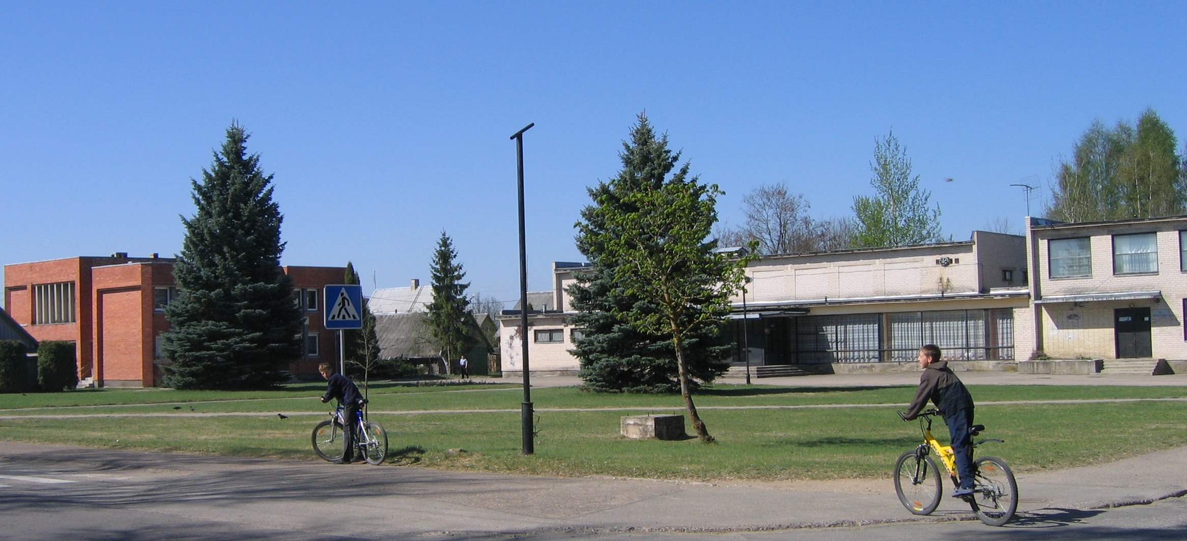 Autoriaus nuotrauka, 2006.05.08. Subačiaus pagr. aikštė. Raudoname pastate - Subačiaus seniūnija. Nuotrauka gali būti platinama pagal GFDL licenciją.